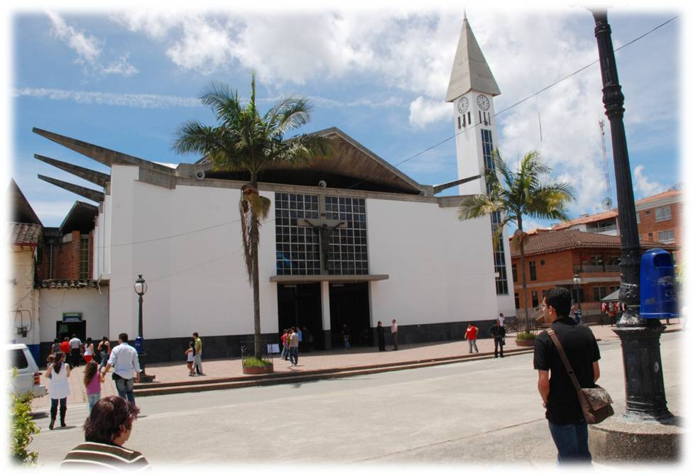 Parroquia dedicada a la Virgen del Carmen en el Carmen de Viboral, Antioquia, Colombia